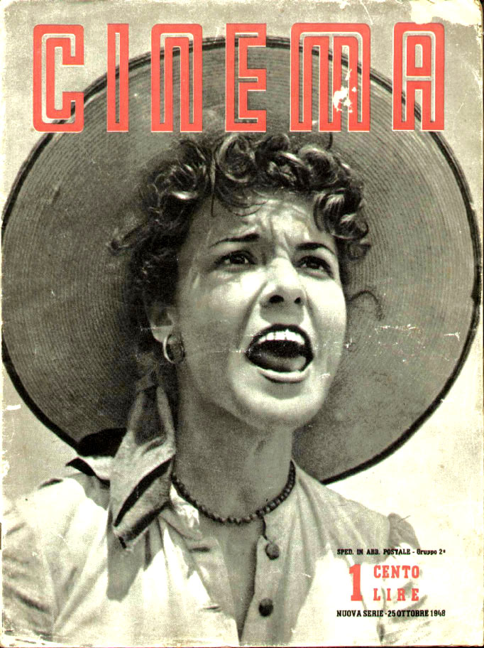 La copertina del primo numero della seconda serie di Cinema, uscito il 25 ottobre 1948. Immagine: fotogramma de Il mulino del Po, regia di Alberto Lattuada, 1949